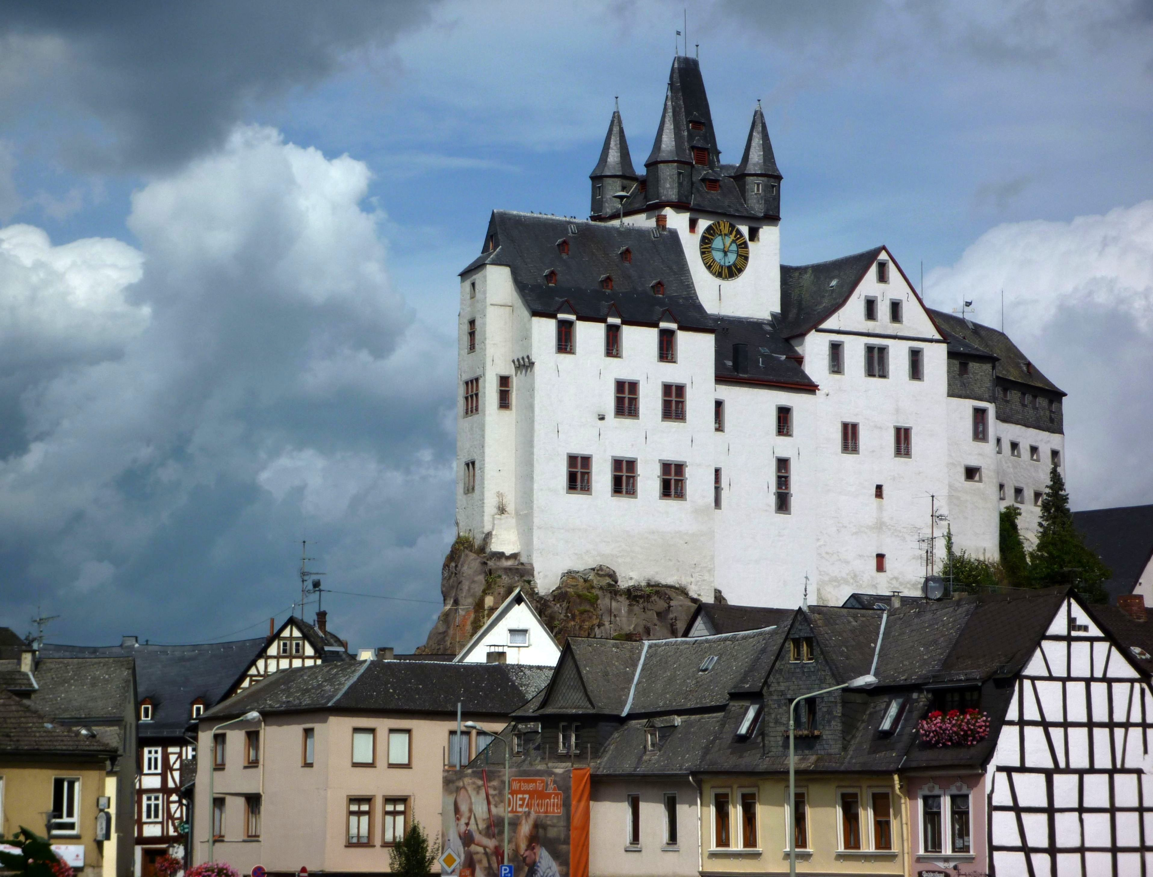 Diez - Landgrafenschloss.jpg